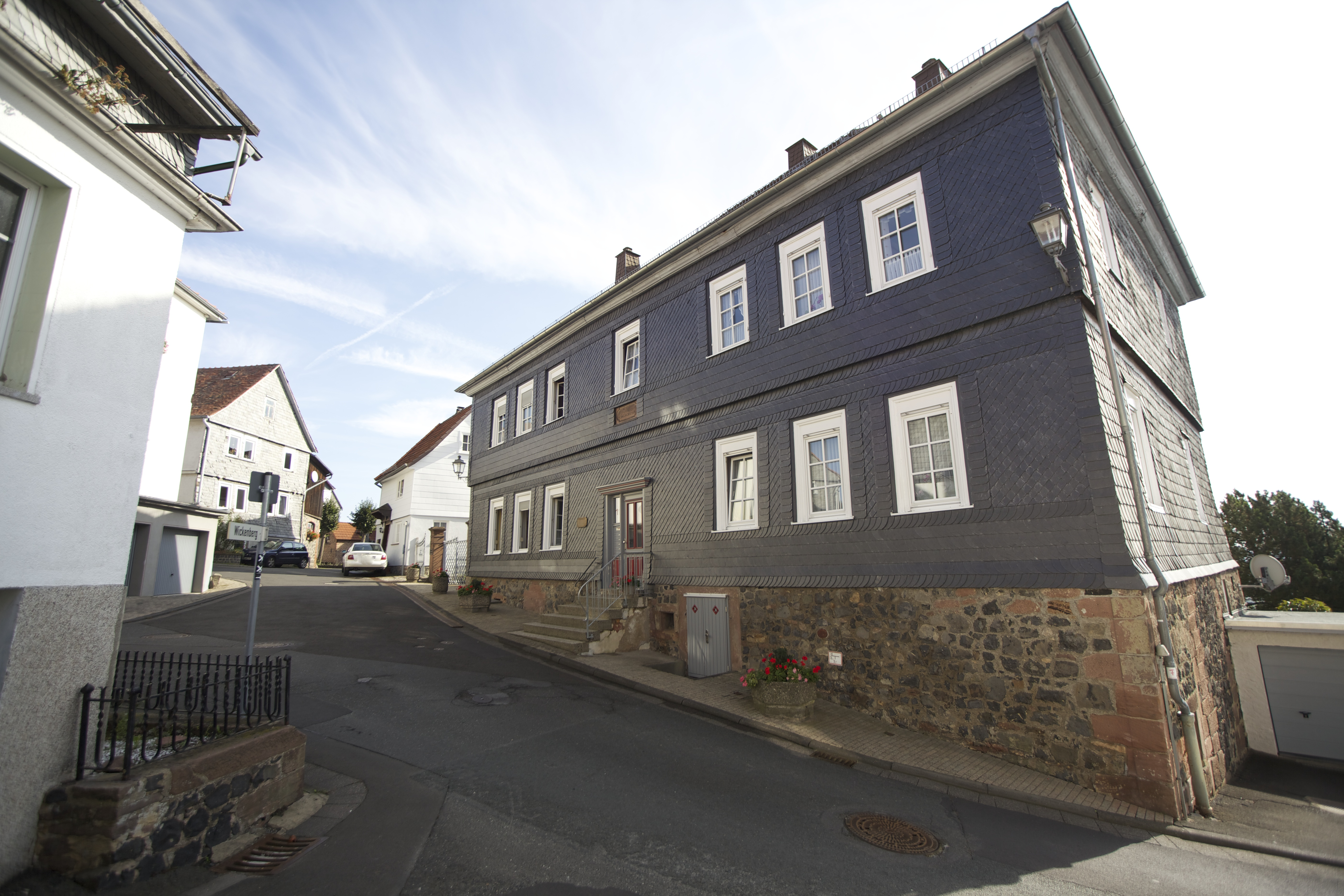 Dieses Foto entstand im Rahmen des Projekts Wiki Loves Monuments Mittelhessen, das aus dem Community-Projektbudget von Wikimedia Deutschland e. V. gefördert wurde.